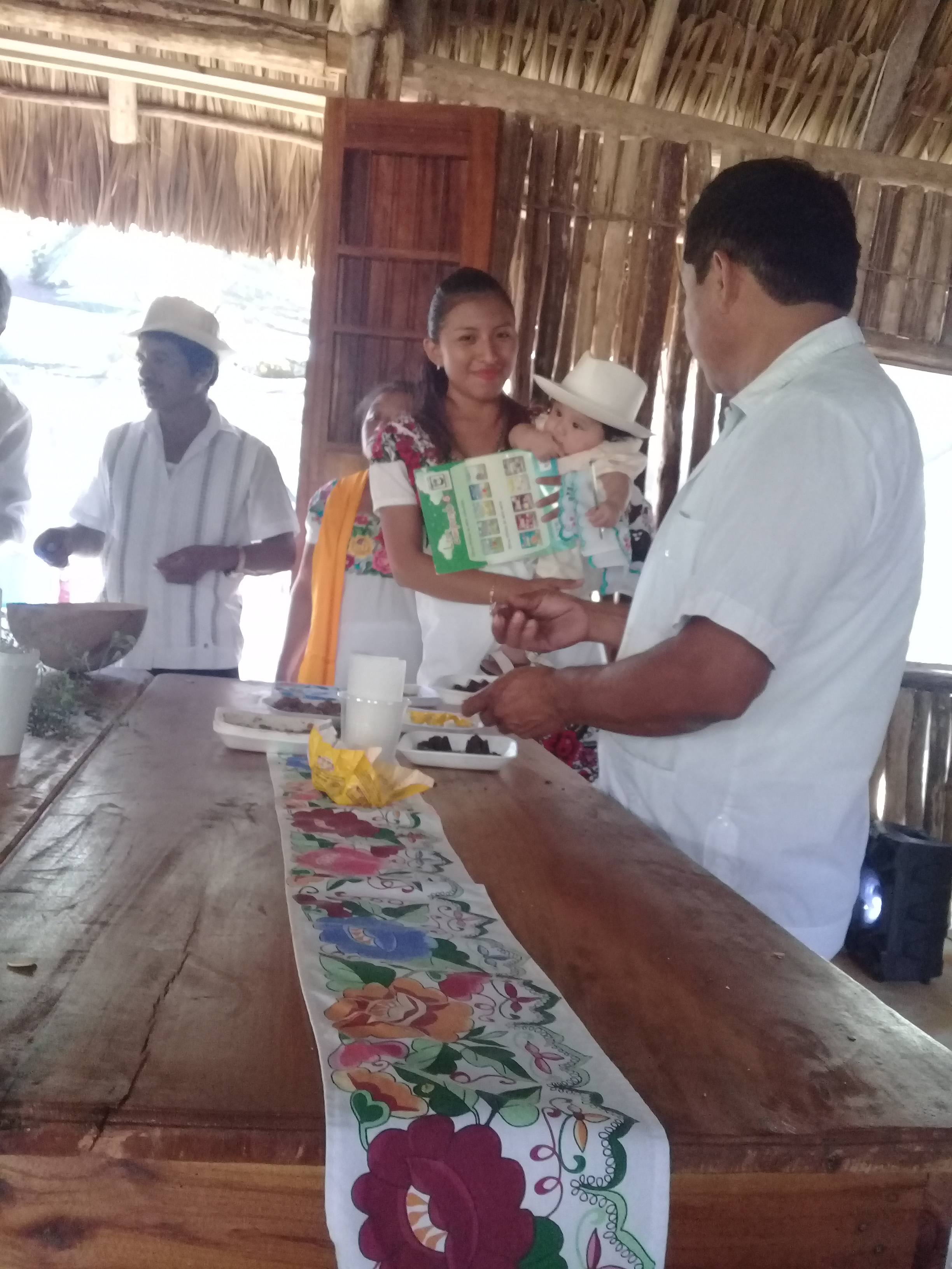 El jéets meek' es un ritual que se le hace a los niños a los pocos meses de nacimiento, a los niños se les hace a los 4 meses y a las niñas a los 3 meses, esto se sigue practicando en las comunidades.